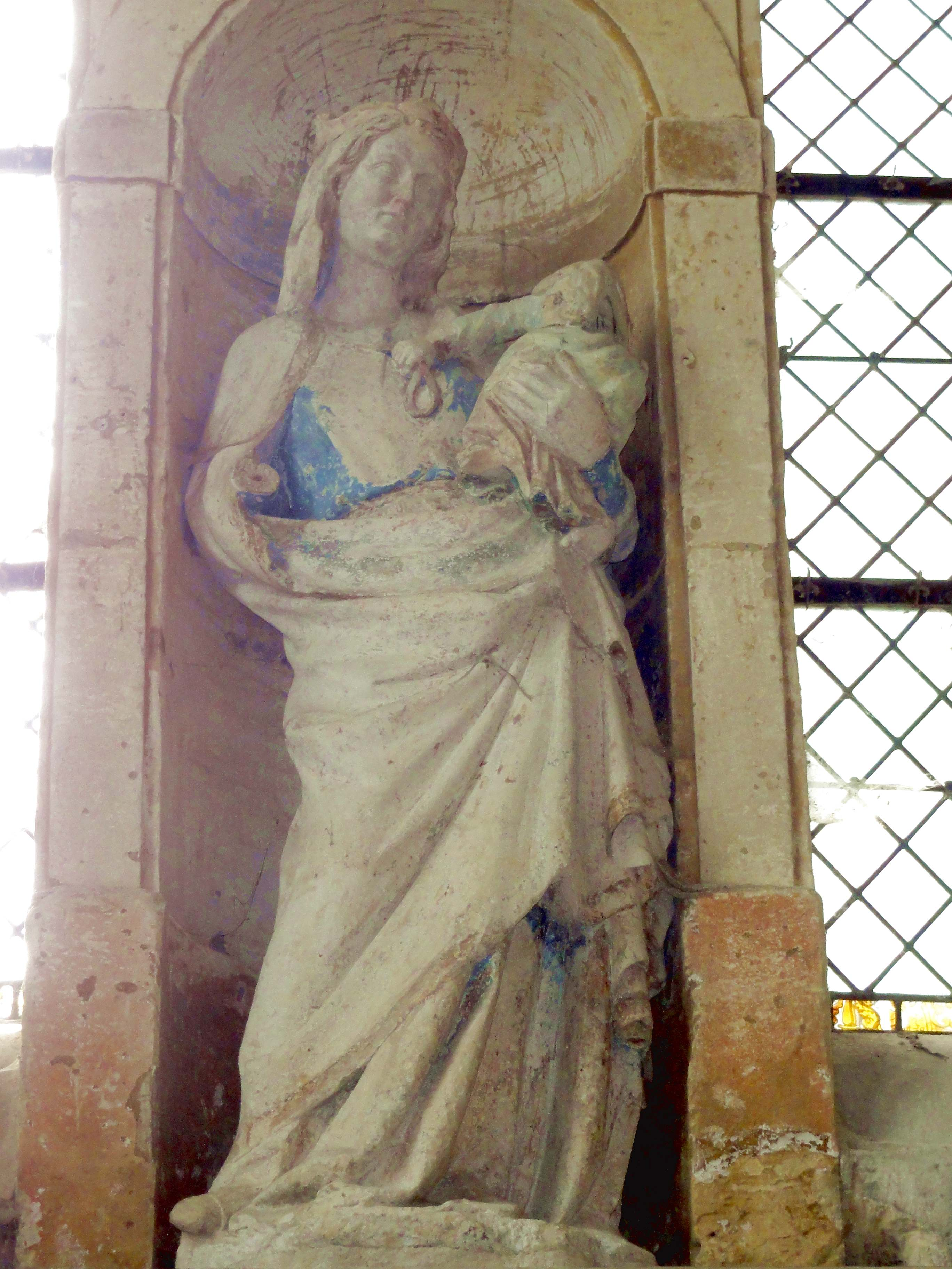 Vierge à l'Enfant, 1ère moitié XIVe siècle.